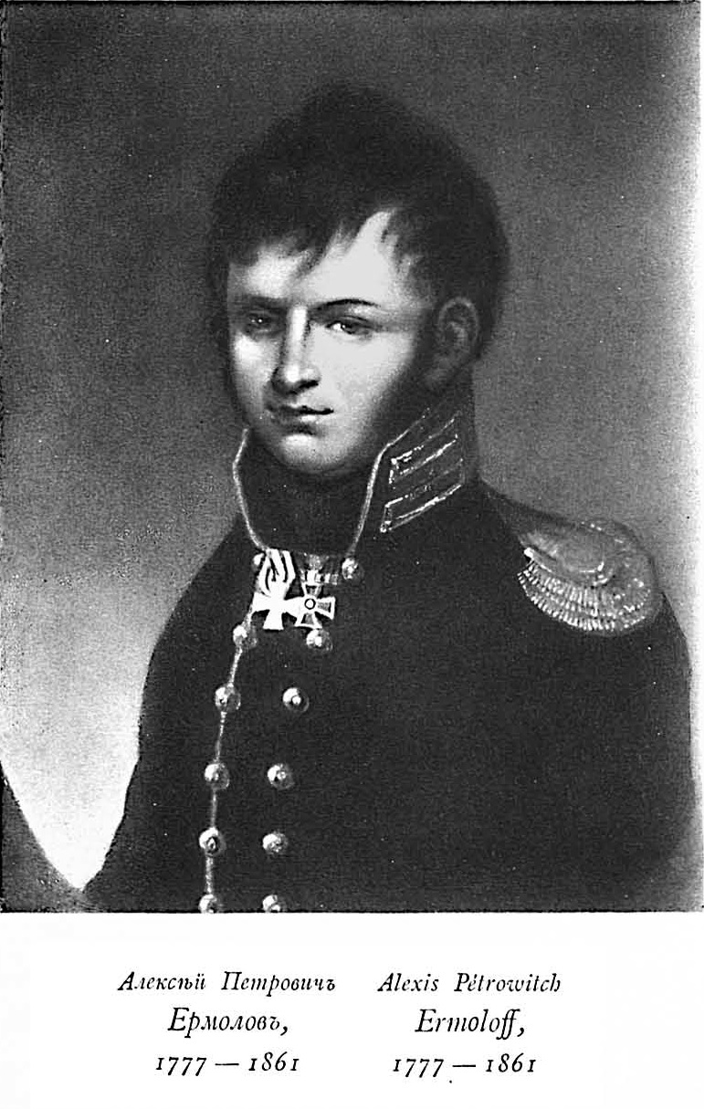 Aleksei Petrovich Ermolov_1777-1861